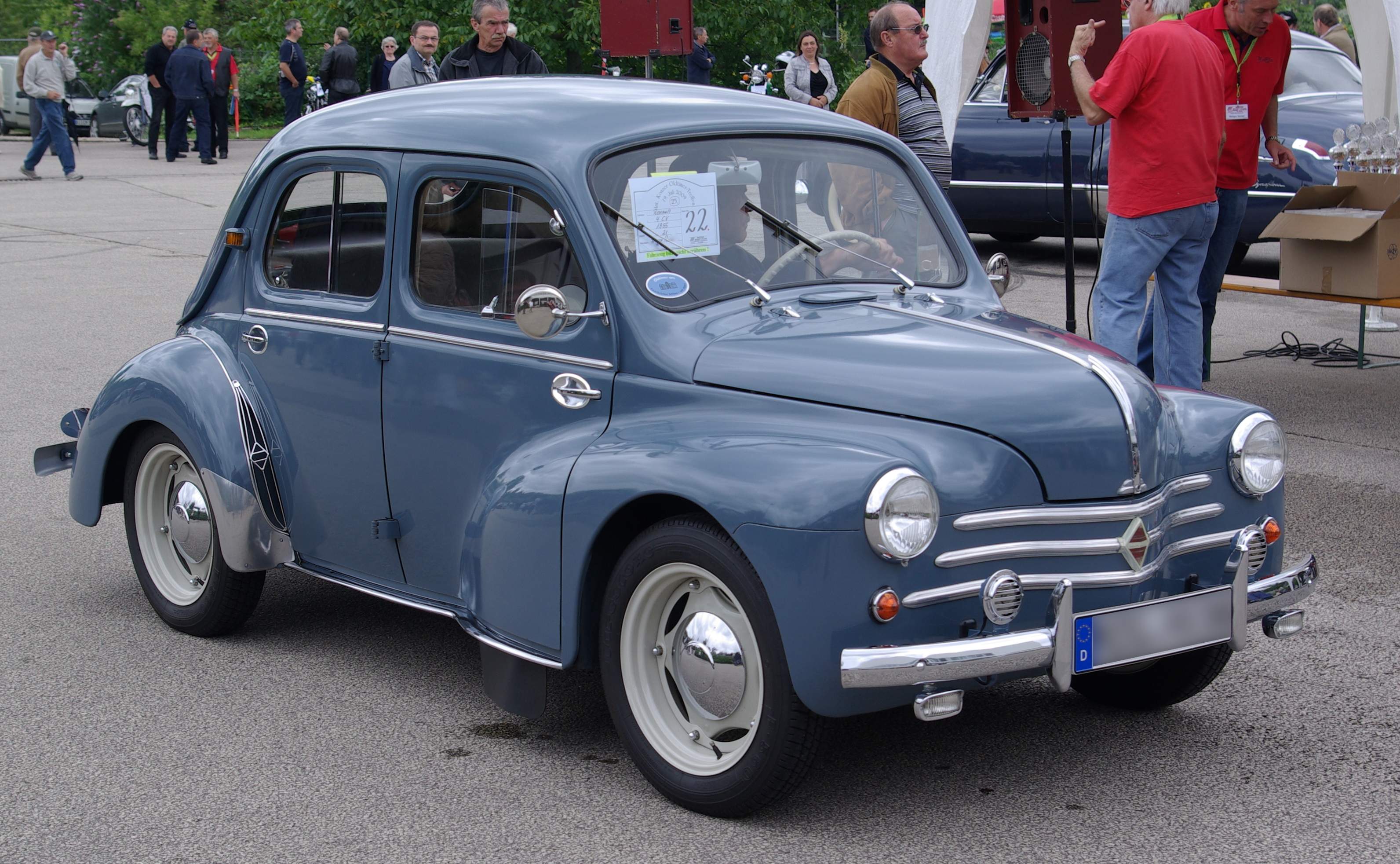 Renault 4CV, Baujahr 1955, Leistung 21 PSlaut Besitzer noch in Originallackierung!